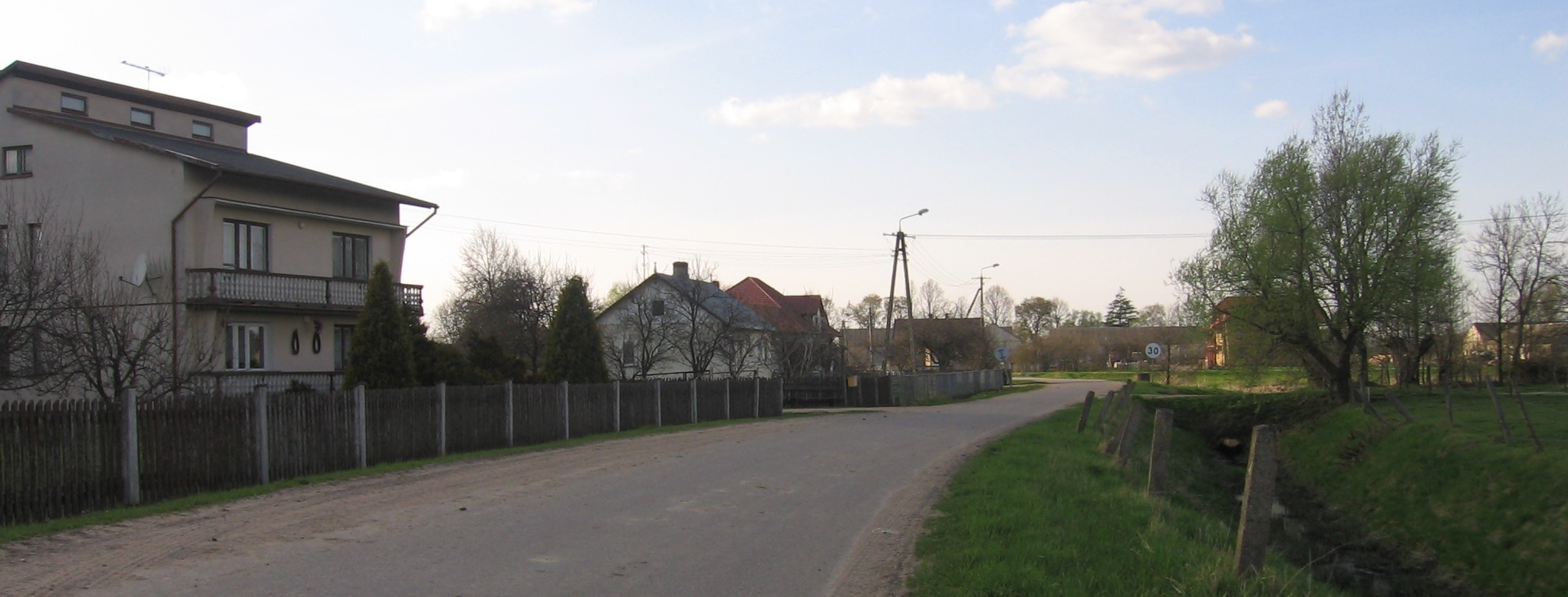 Panorama wsi Szepietowo-Żaki.